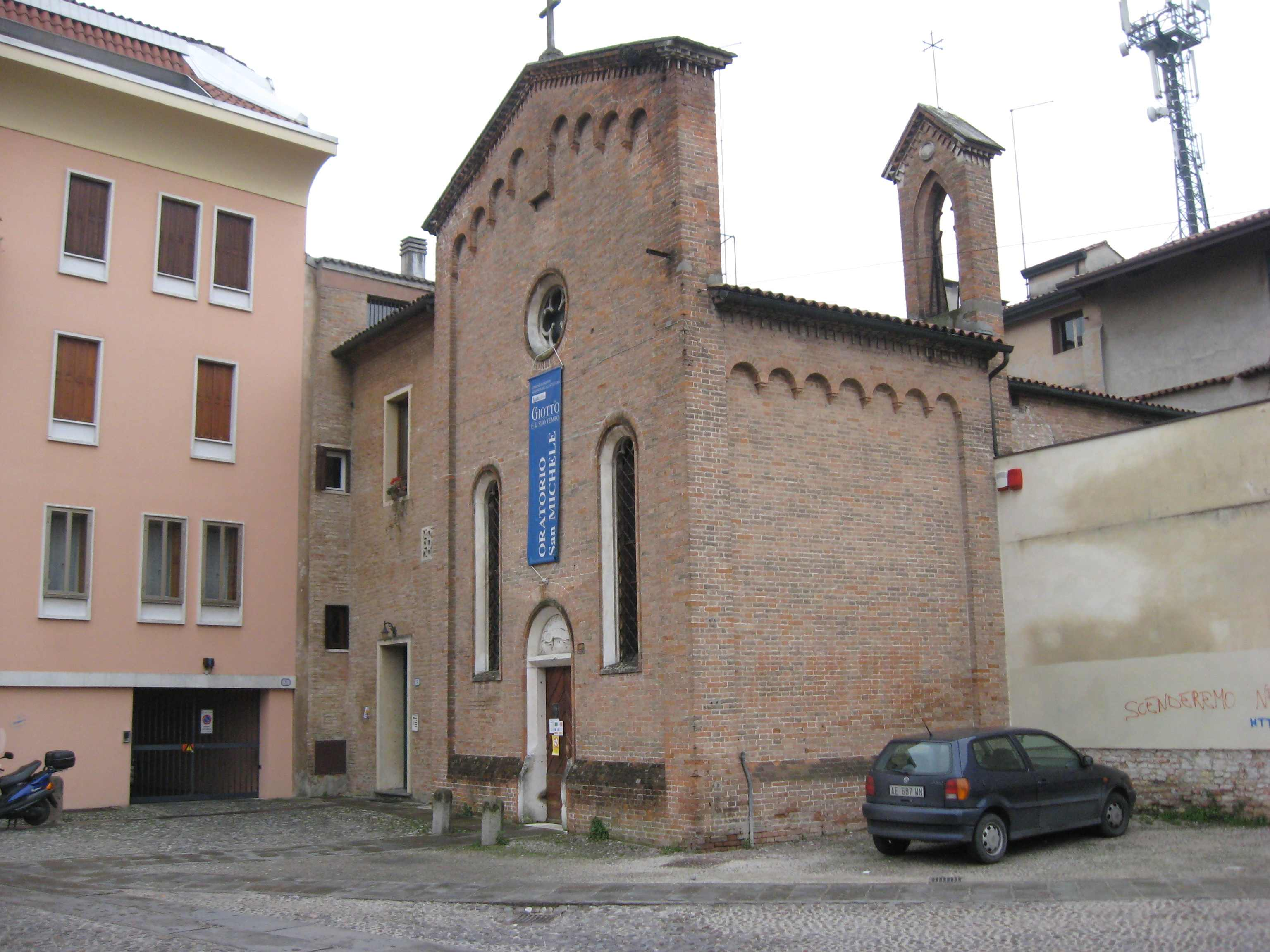 Oratorio San Michele